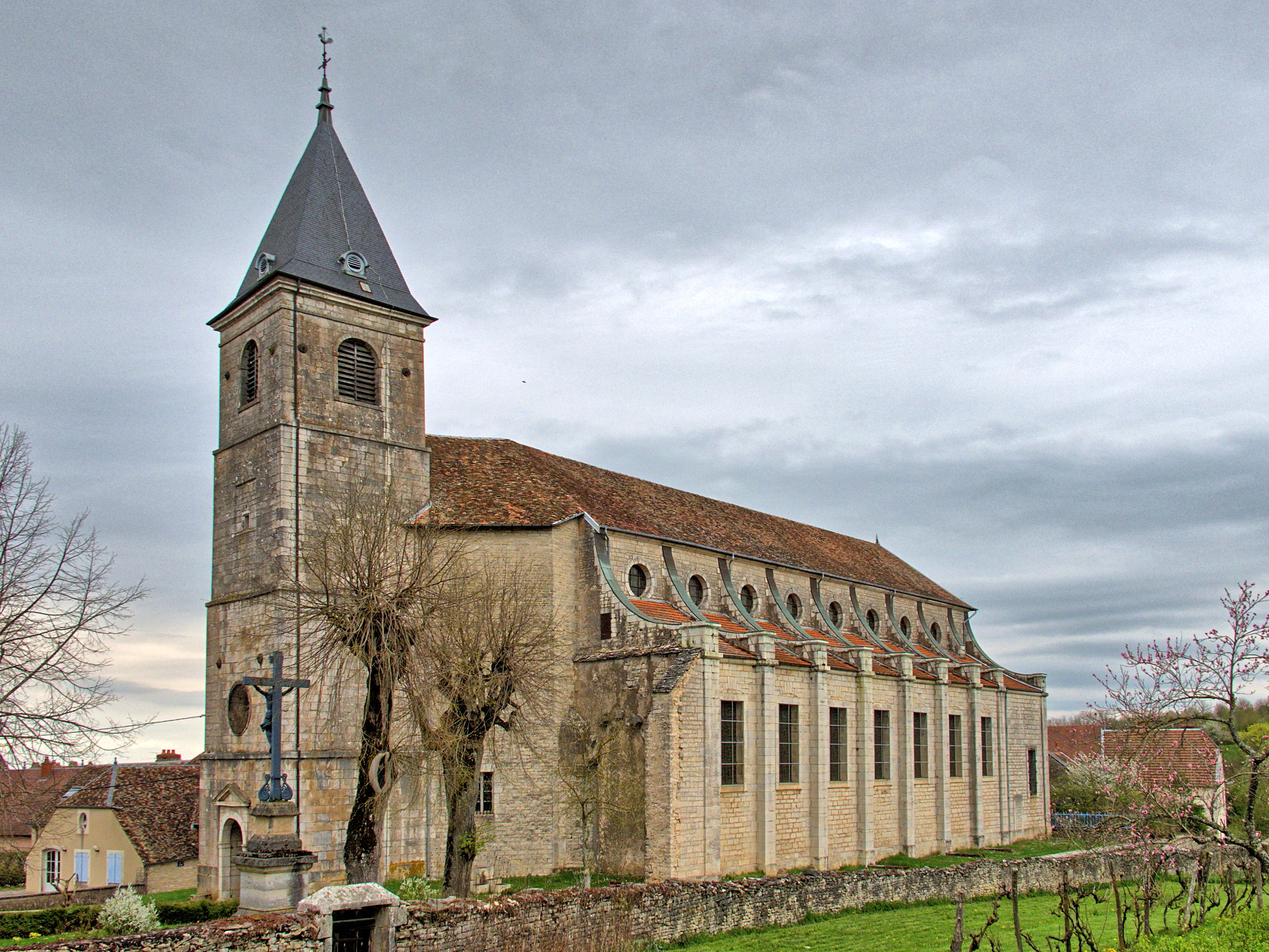 Inscrit aux monuments historiques sous le numéro PA00102191